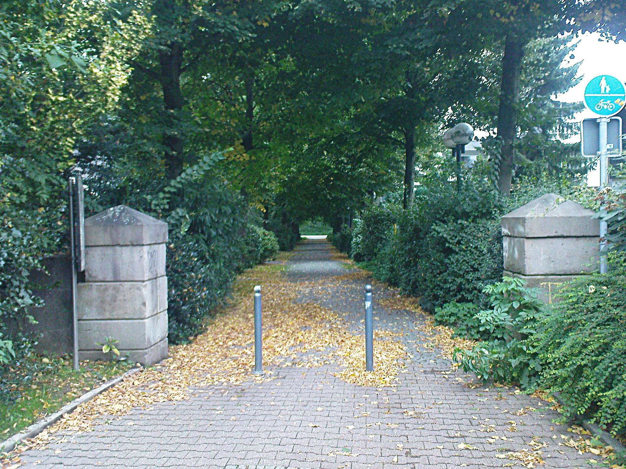 Neue Allee mit alten Pfosten, ehemaliger südlicher Zugang zum Haus Dudenroth